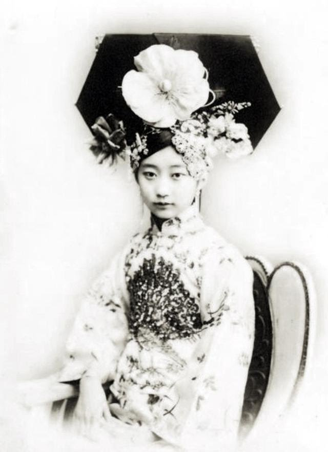 王敏彤，完颜氏